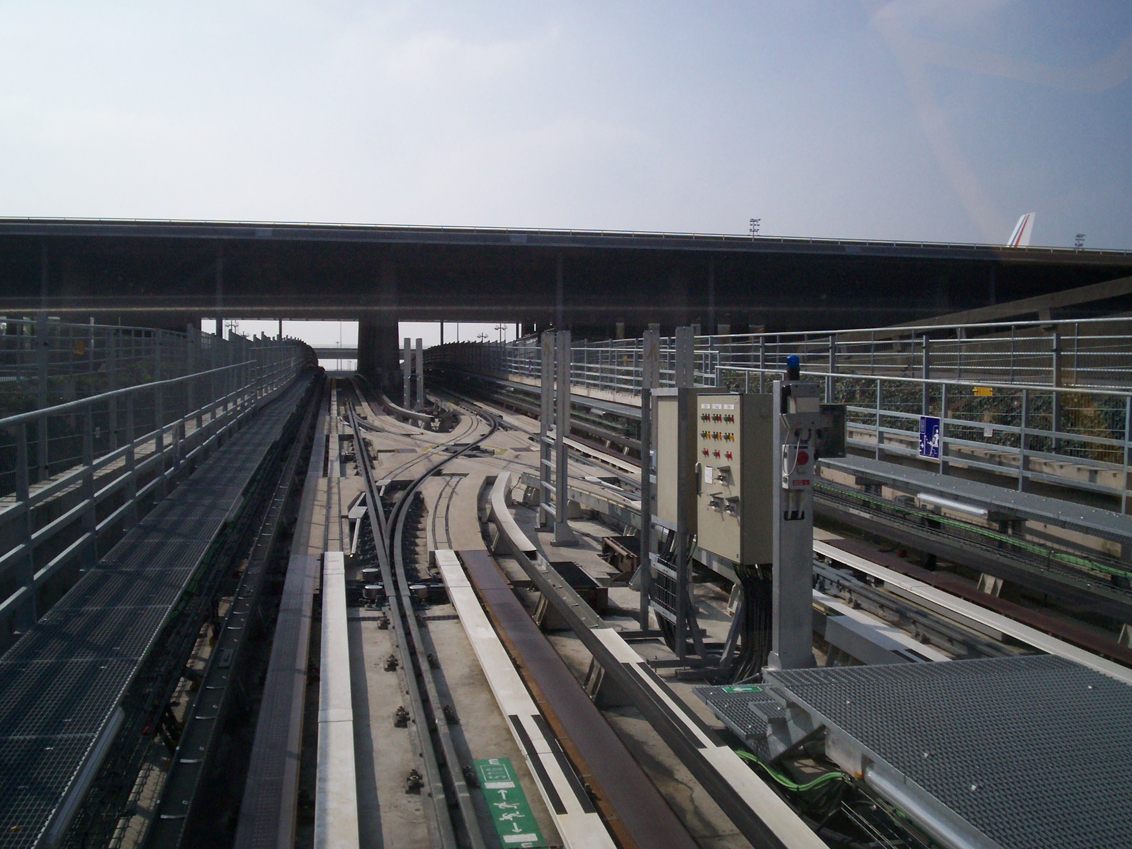 Vue d'aiguillages vers le terminal 1